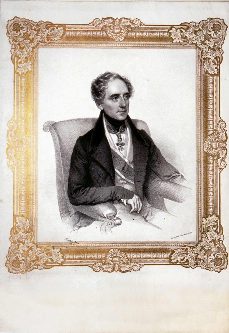 Moritz Joseph Johann Dietrichstein 1775-1864), Fürst, Leiter der Hoftheater und Bibliothek, Komponist, Erzieher des Herzogs von Reichstadt. Lithographie von Josef Kriehuber, 1839